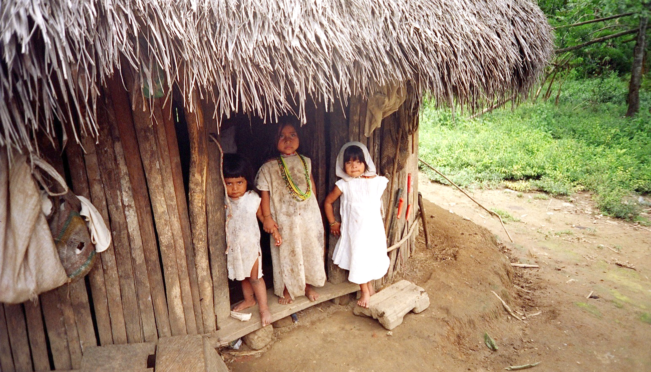 Fotografiert von Thomas Dahlberg, Oktober 2004 Kategorie:Bild:Gebäude